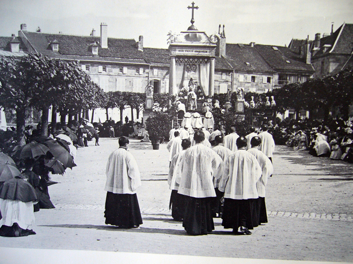 Français cadien: langres